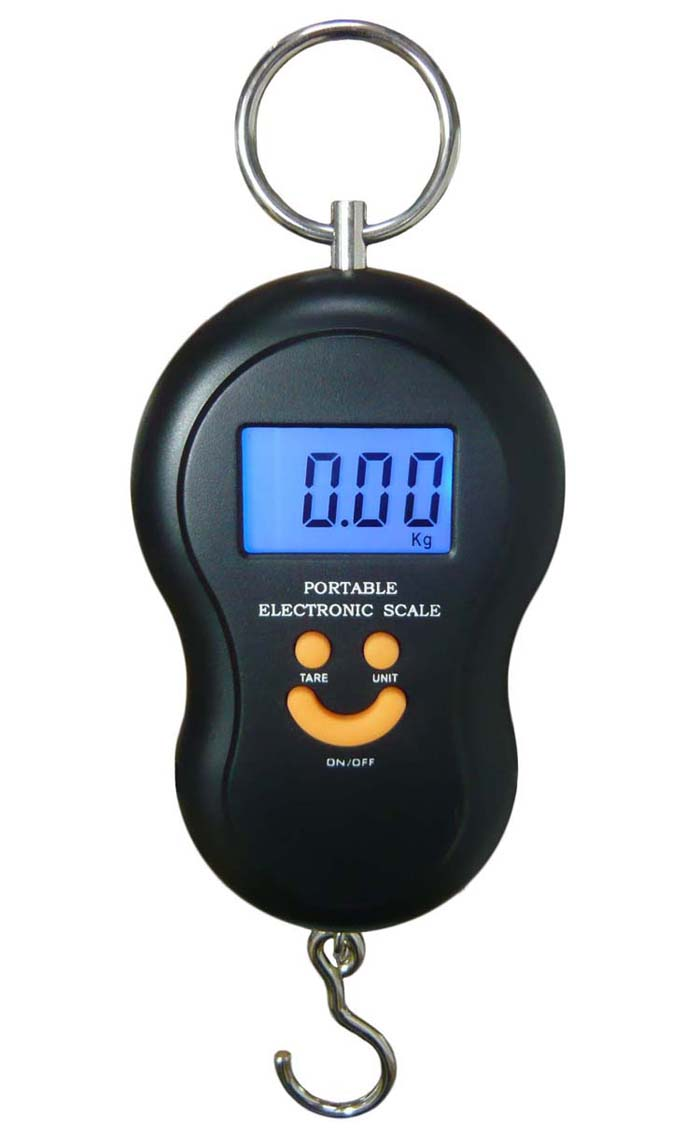 電子ばかり